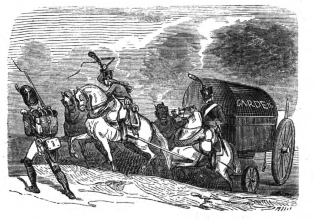 Train der französischen Kaisergarde 1806